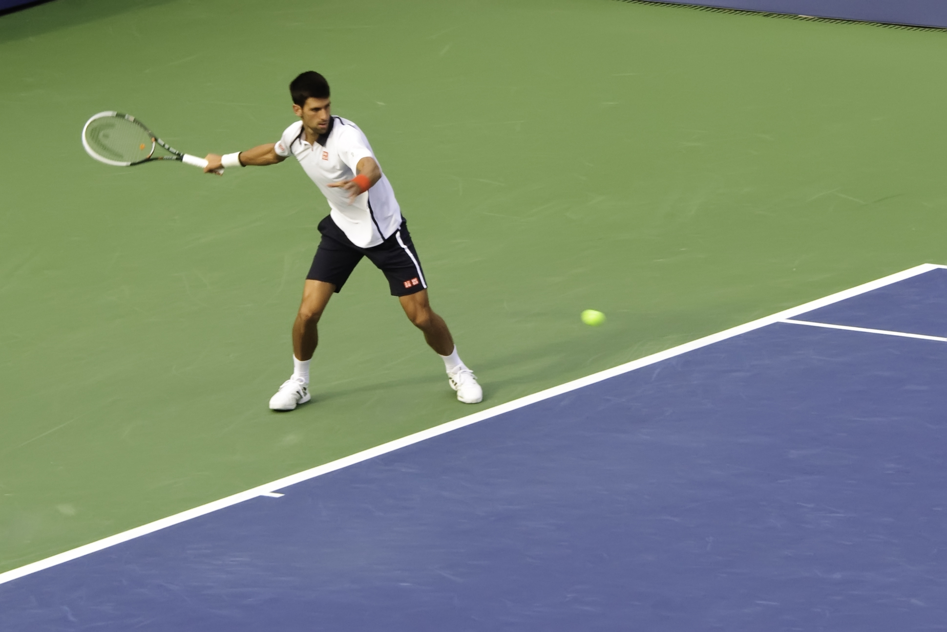 Novak Đoković à l'US Open en 2012.